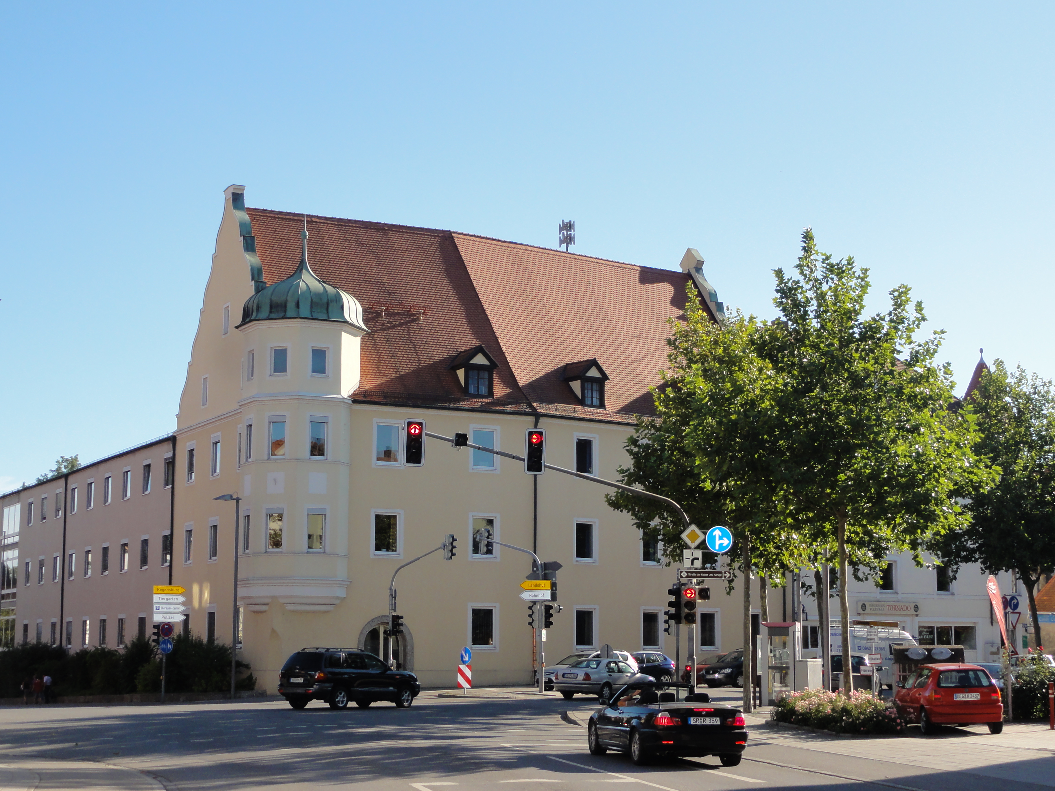 Straubing - Amtsgericht Info GPS data may be inaccurate. EXIF data regarding date and time may be inaccurate.